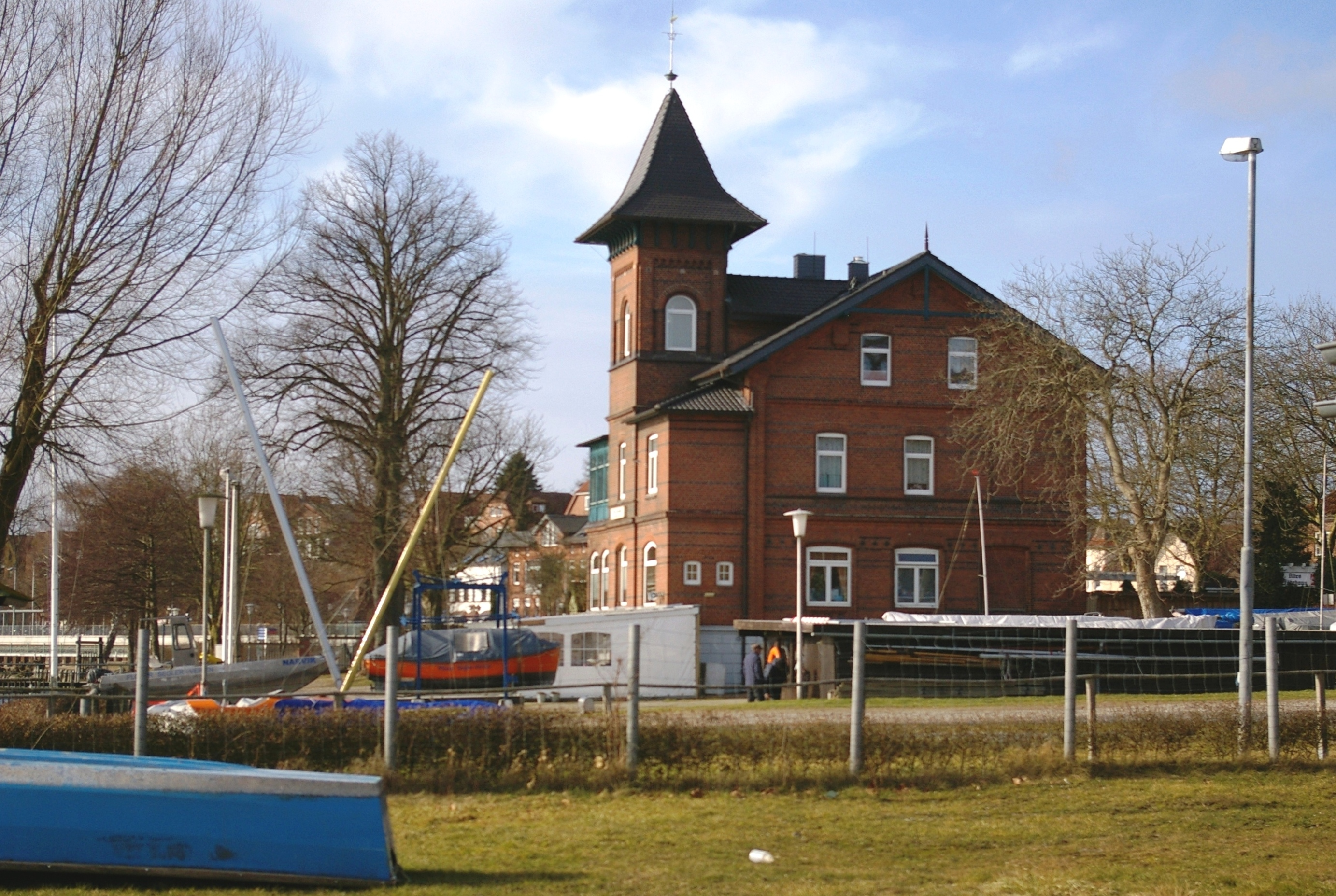 Das Gebäude eröffnete Dr. Otto Zacharias 1892 als biologische Station.